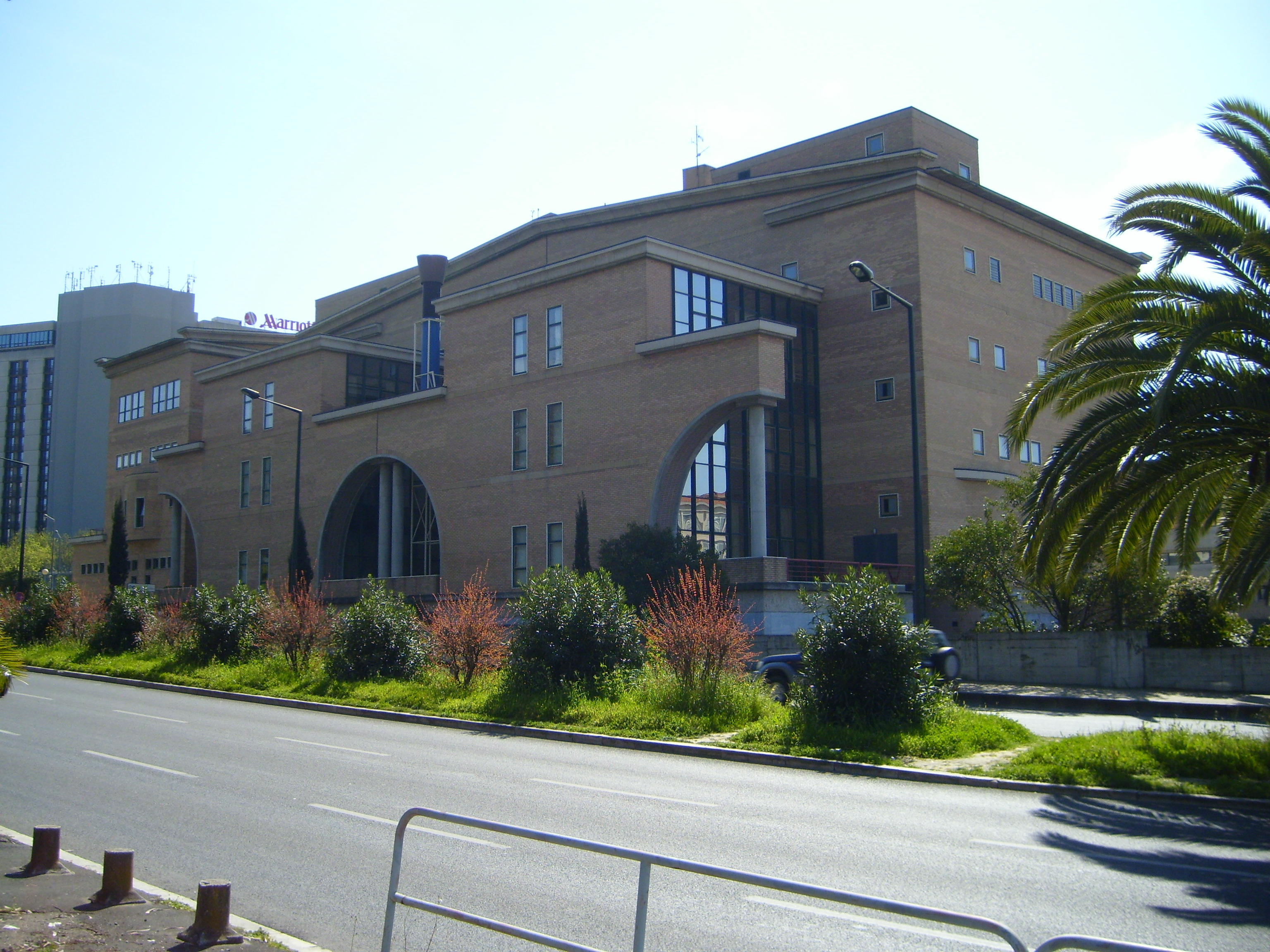 Die Fakultät für Wirtschaft und Management (Faculdade de Ciências Económicas e Empresariais, FCEE) auf dem Campus der Katholischen Universität Portugal (Universidade Católica Portuguesa, UCP) in Lissabon.